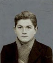 Photo d'identité Marcel Reddet